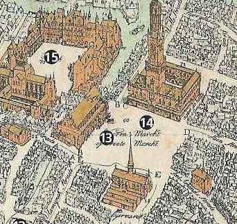 Sint-Christoffelkerk op de markt te Brugge - België